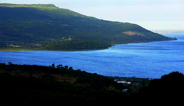 Lagoa dos Barros, em Osório